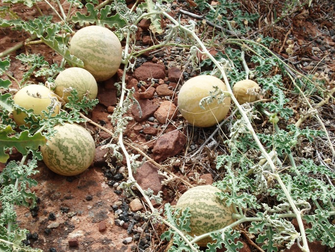 Citrullus-lanatus_Tsamma-Melon_in Australien